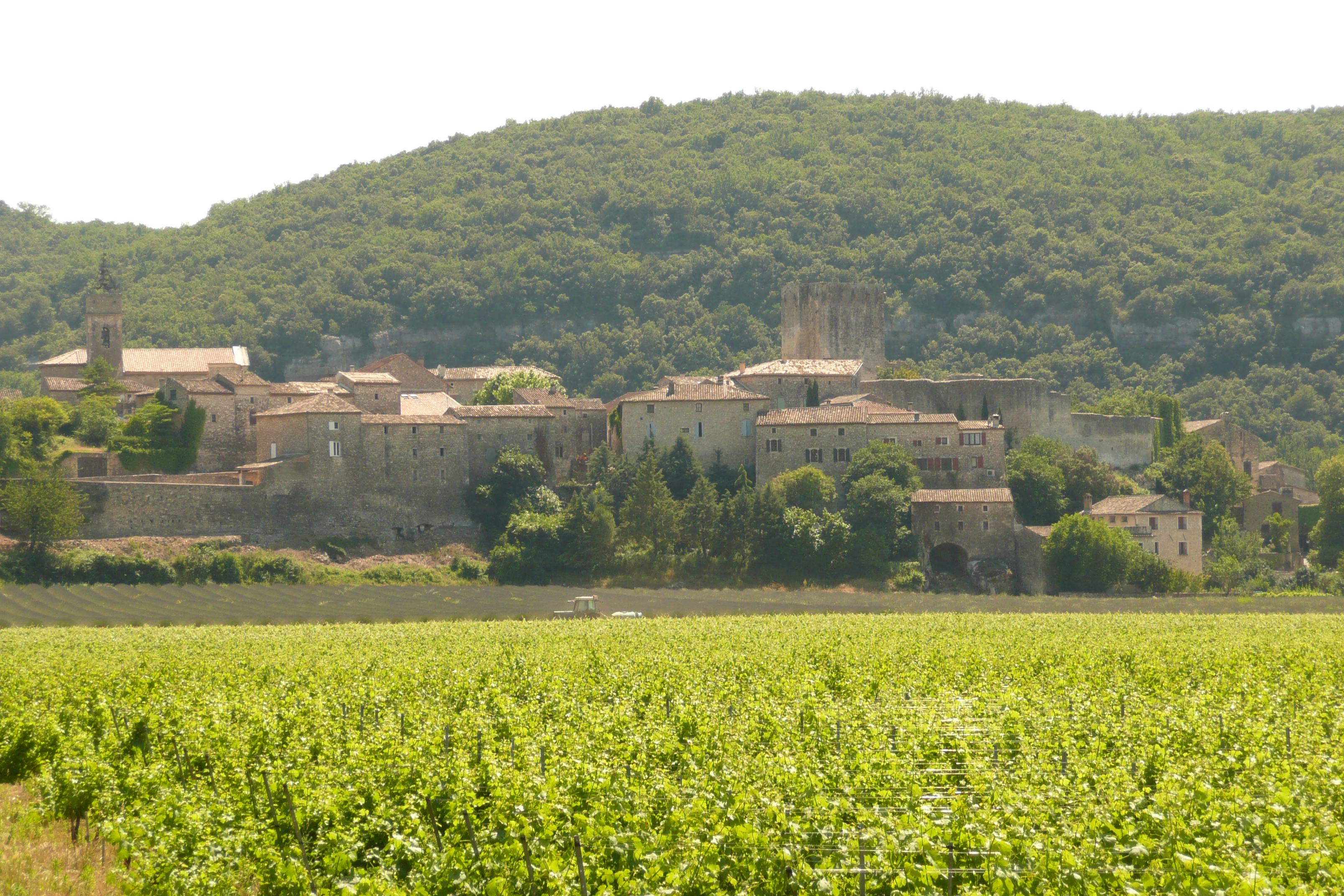 Montclus (Gard).